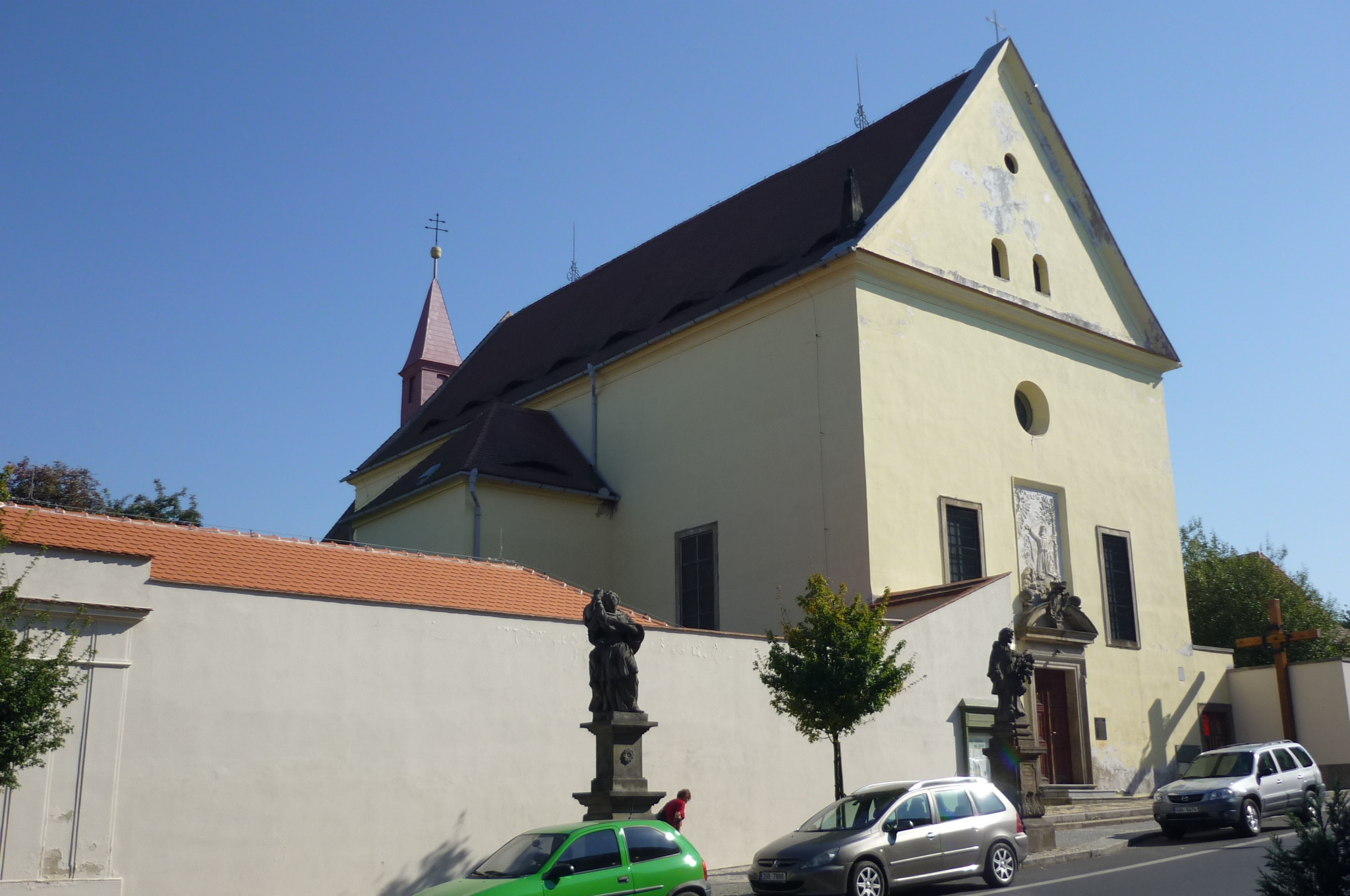 Kapuzinerkirche am Klostergarten in Saaz